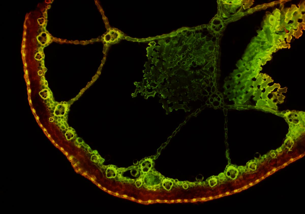 Příčný řez stonkem skřípince (Schoenoplectus lacustris): Aerenchym. Prázdné prostory jsou plné vzduchu, vidět jsou svislé i vodorovné přehrádky. Na křížení přehrádat cévní svazky s typicky jednoděložnou stavbou